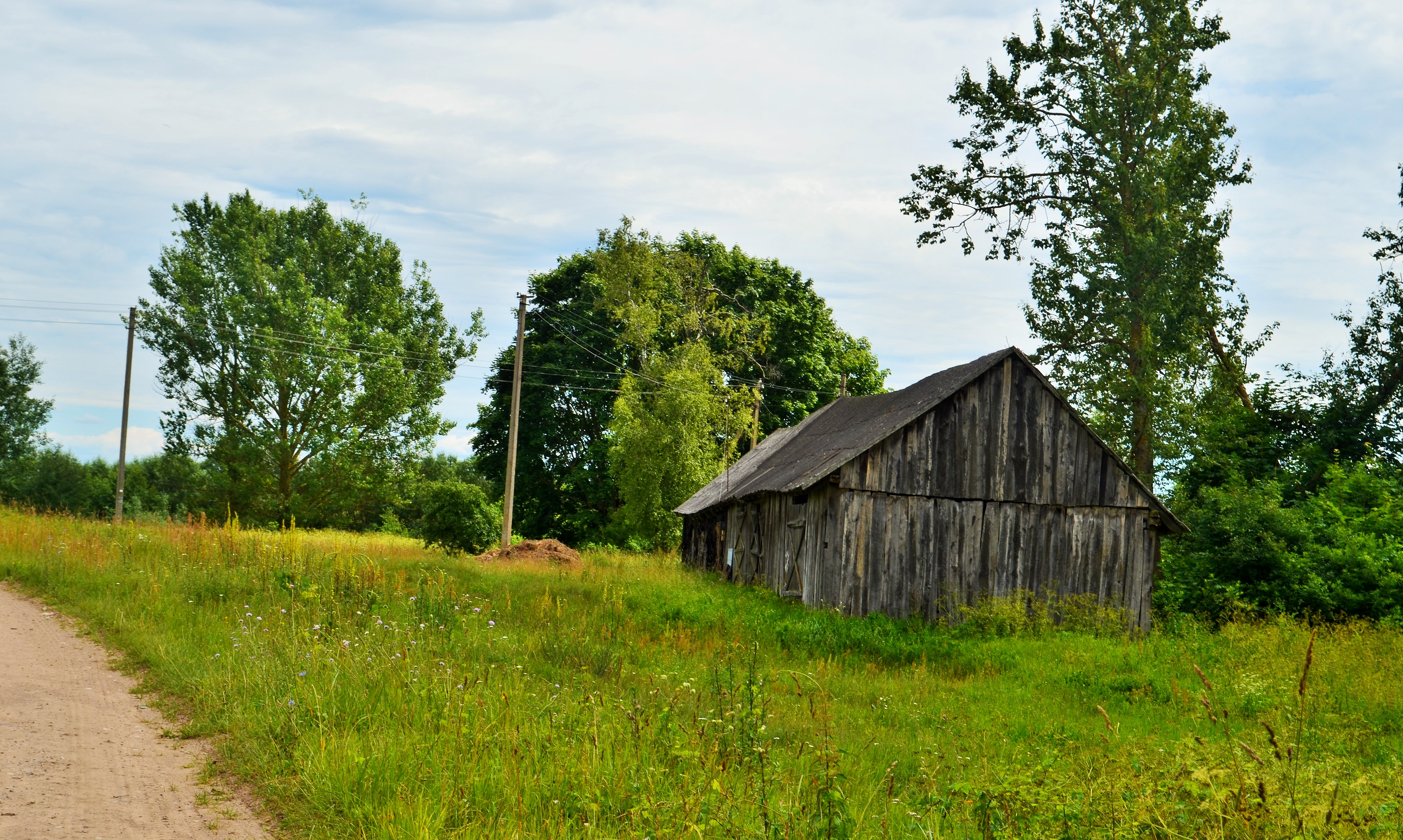 Jaskaičiai, Kėdainių raj.